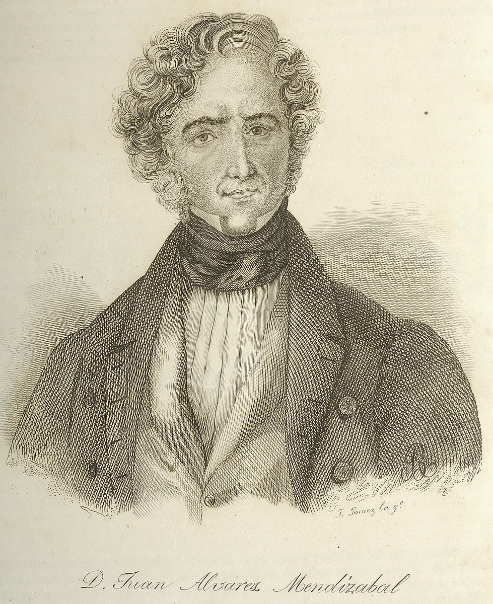 Juan Álvarez Mendizabal (1790–1853).